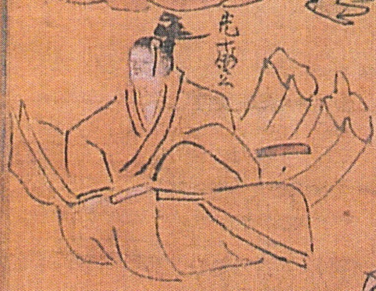 戸沢家19代戸沢光盛の肖像画(戸沢家歴代肖像より)。